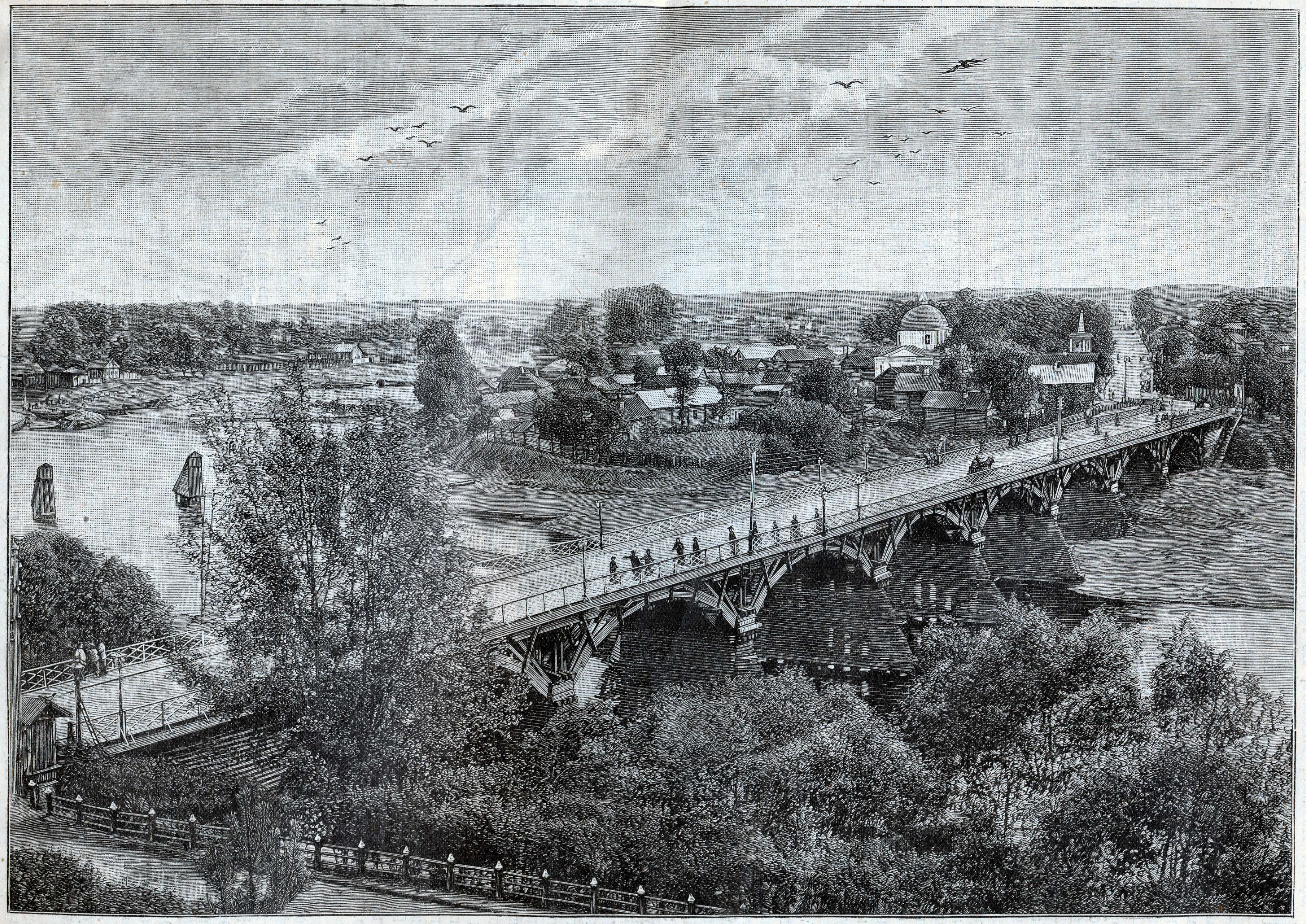 Беларуская (тарашкевіца): Магілёў (Mahiloŭ), панарама Лупалава (Łupałava) і Траечча (Traječča)